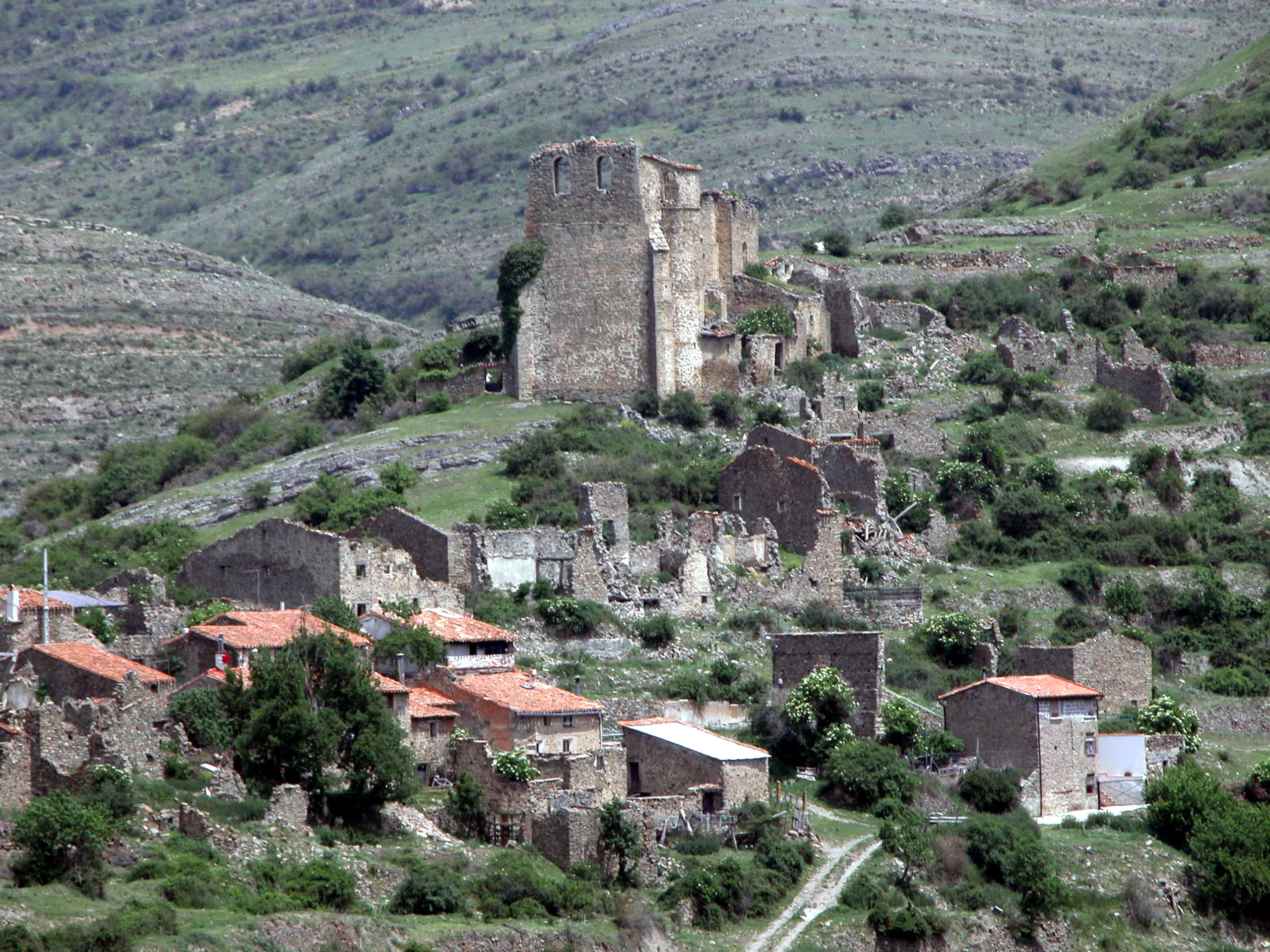 TORREMUÑA (Aldea de AJAMIL DE CAMEROS). Vista desde la carretera de Vadillos.